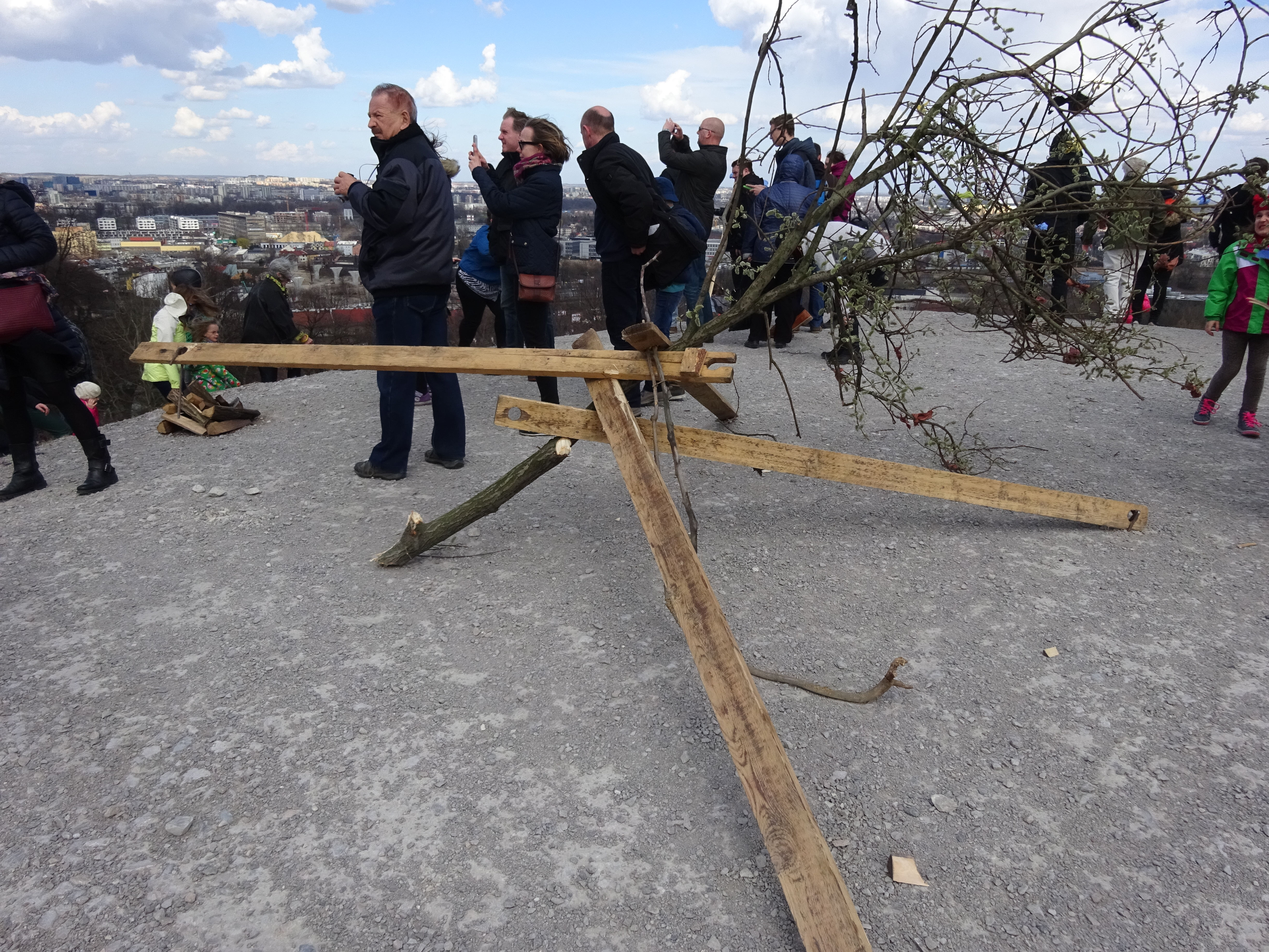 Dekoracja na szczycie Kopca Kraka - palenisko i wiecha stylizowane na pogańskie. Obchody Święta Rękawki w 2016 roku. Kraków, 2016.